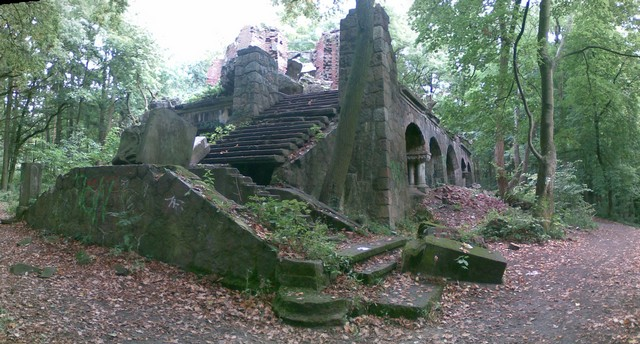 Szczecin, Wieża Quistorpa (zabytek nr 171)